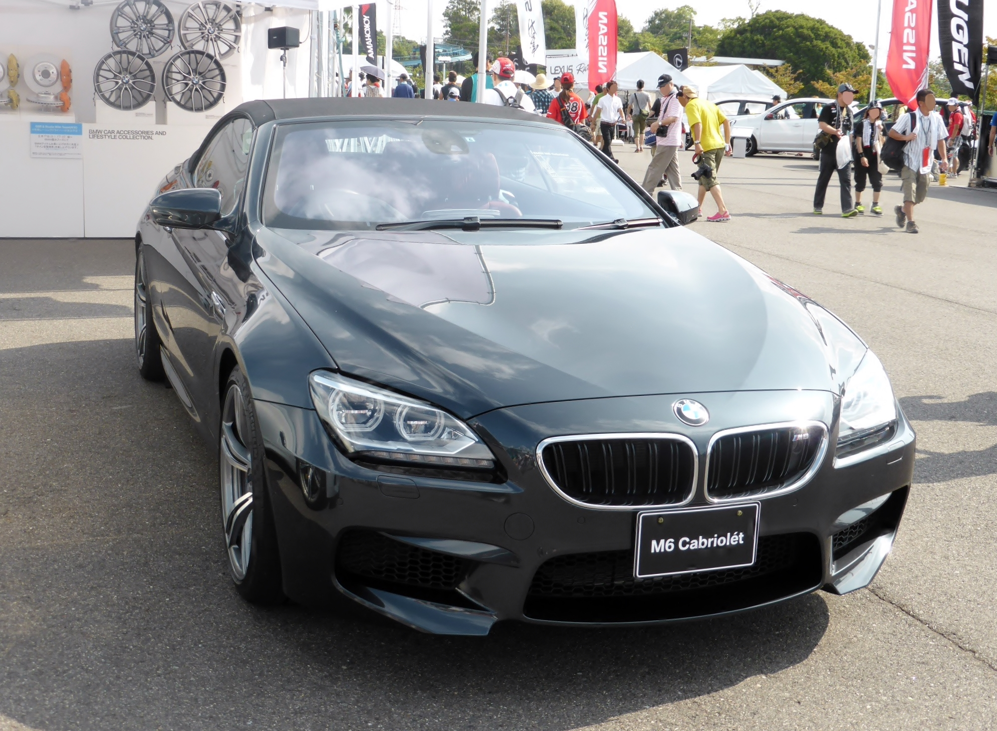 F12型BMW・M6カブリオレを幌の閉じた状態でフロントから撮影。